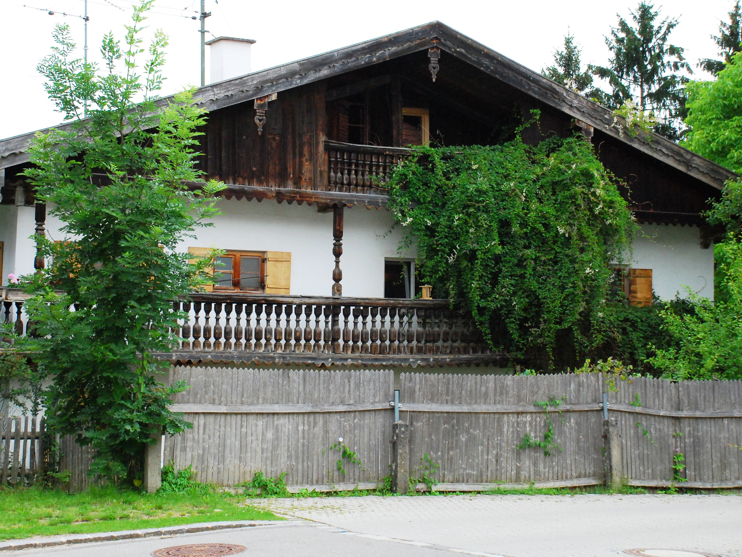 Bauernhaus "Schusterkaspar" in der Unteren Dorfstraße 4 in Aying, Landkreis München, Bezirk Oberbayern, Bayern. Als Baudenkmal in der Bayerischen Denkmalliste unter Aktennummer D-1-84-137-16 aufgeführt. Laut Denkmalliste Ende des 18. Jahrhunderts erbaut. Foto gemäß den Voraussetzungen zur Panoramafreiheit von öffentlicher Verkehrsfläche aus aufgenommen.